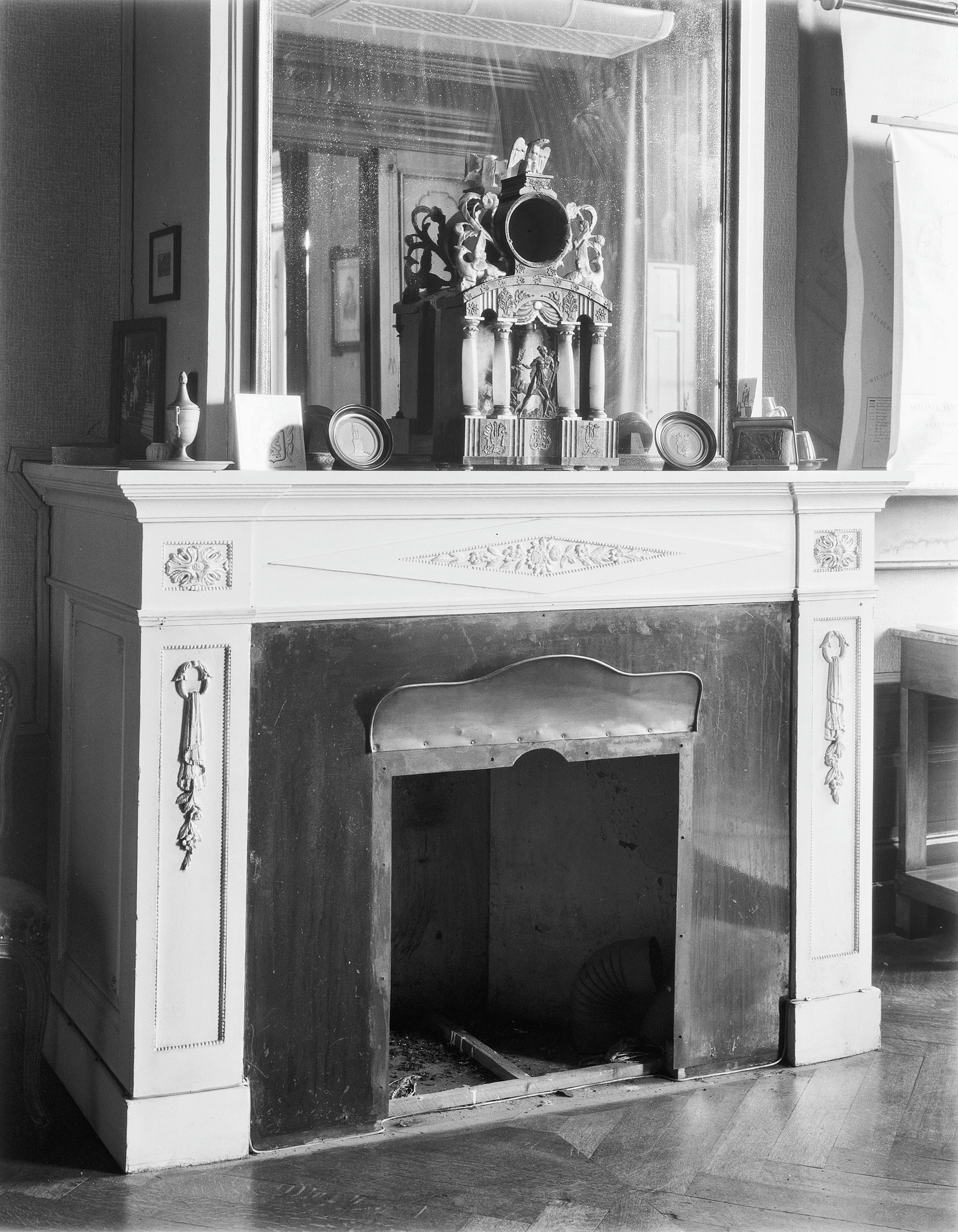 Van Dishoeckhuis: Interieur, schouw in burgemeesterskamer (opmerking: Van Dishoeckhuis is gesloopt in 1986)